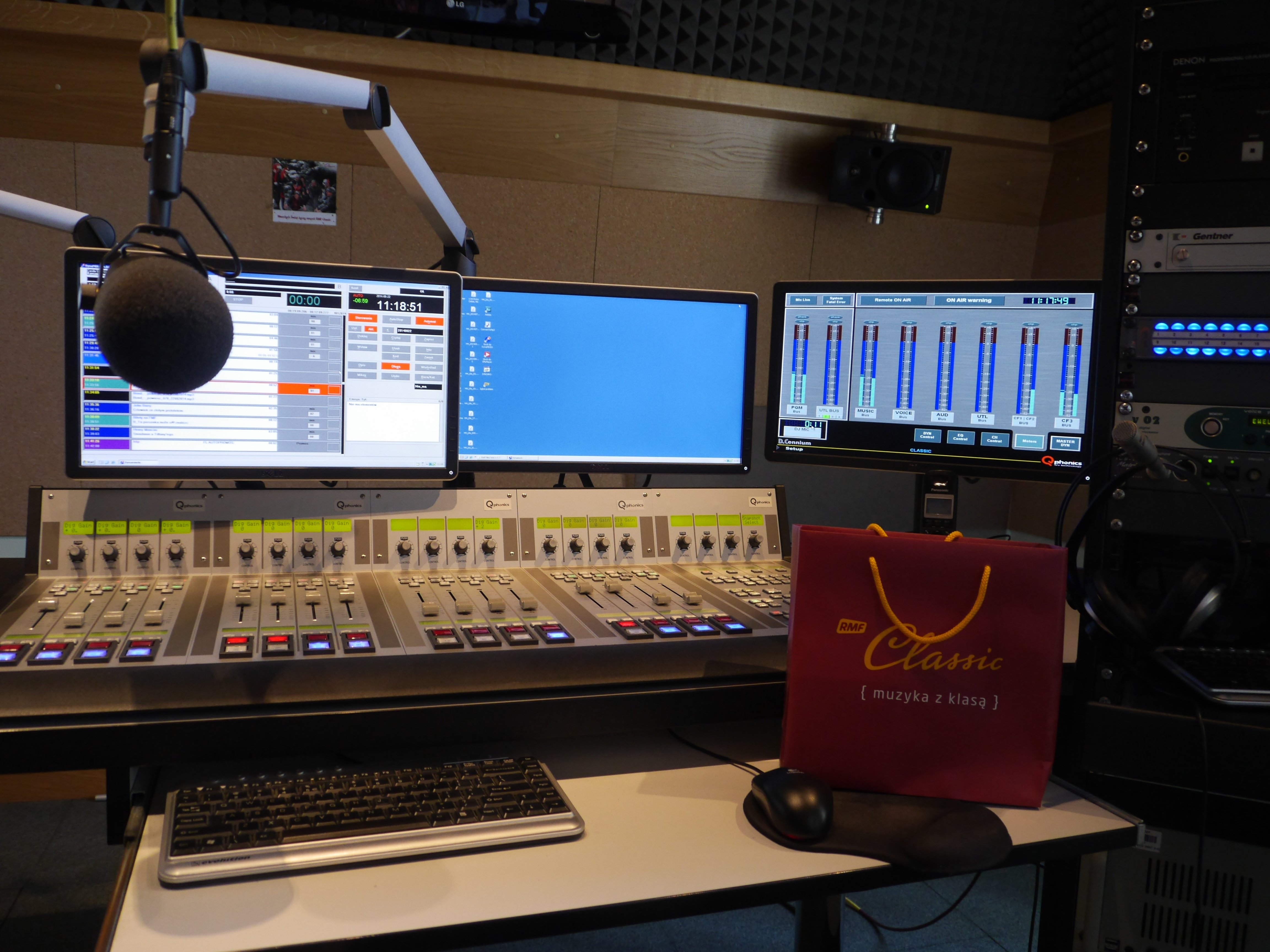 Siedziba radia RMF FM, al. Waszyngtona 1, 30-204 Kraków This photo was taken with Panasonic Lumix DMC-GH3 camera, thanks to Panasonic. You can see all photographs in category: Taken with Panasonic Lumix DMC-GH3.